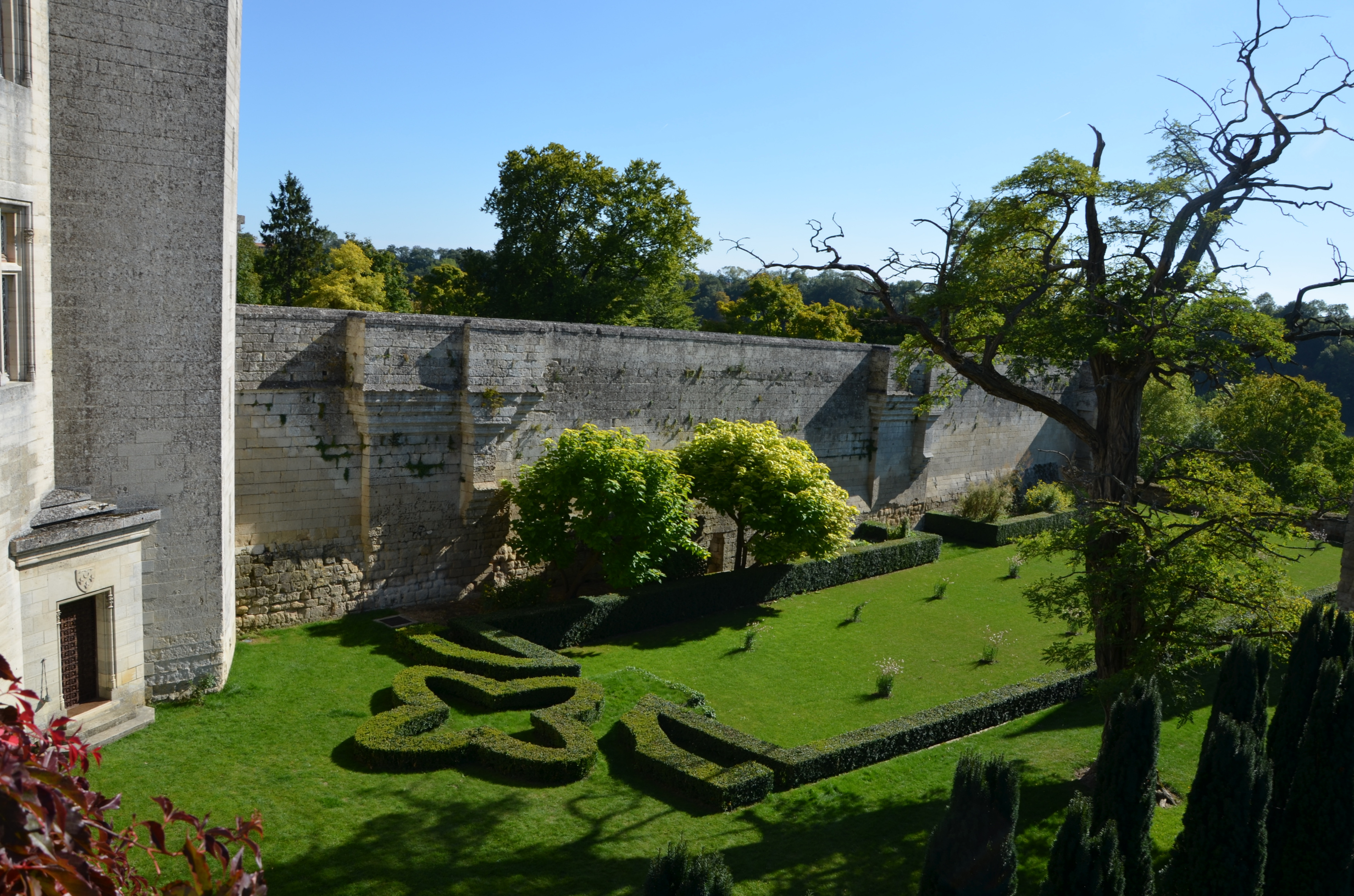 Jardins du donjon de Vez, Oise, Picardie, France